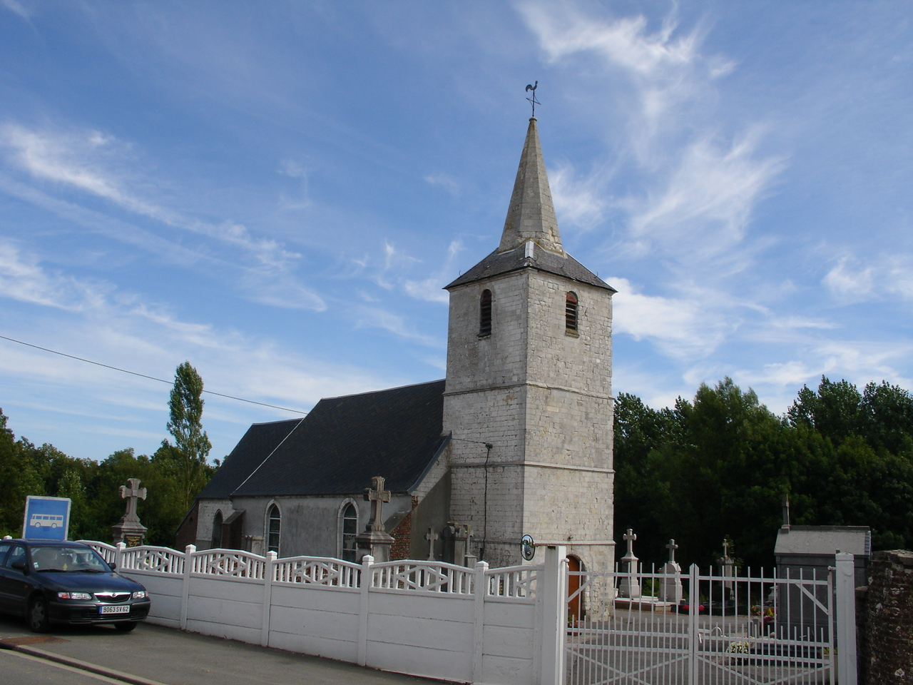 Église de Ledinghem